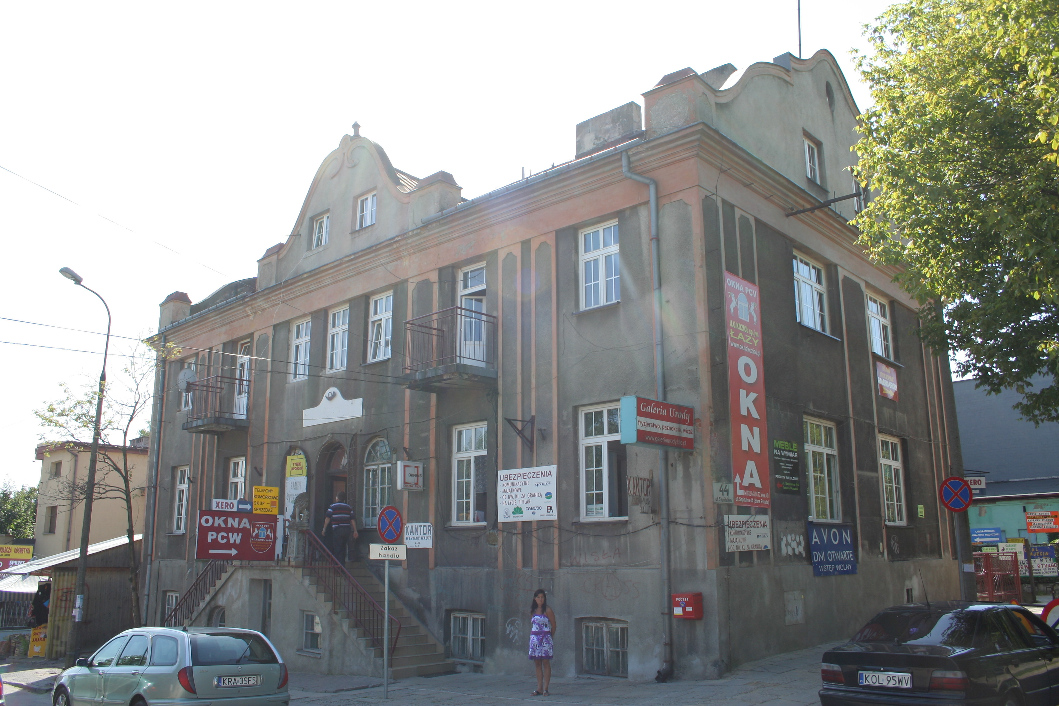 Dawny budynek poczty w Olkuszu.